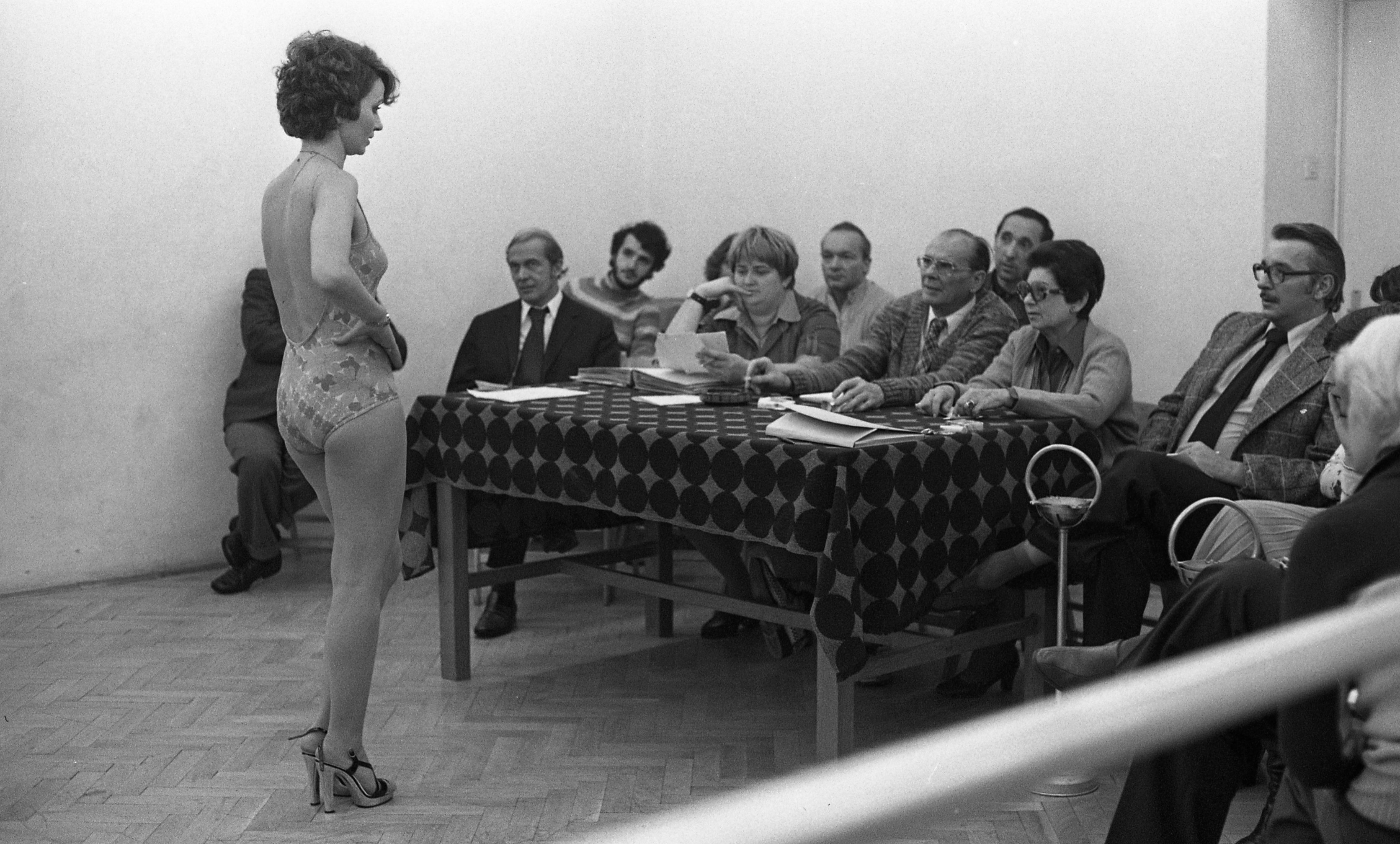 Állami Artistaképző Intézet, manökenjelöltek felvételi vizsgája. Location: Hungary, Budapest VII. Tags: bathing suit, Budapest Title: Állami Artistaképző Intézet, manökenjelöltek felvételi vizsgája.